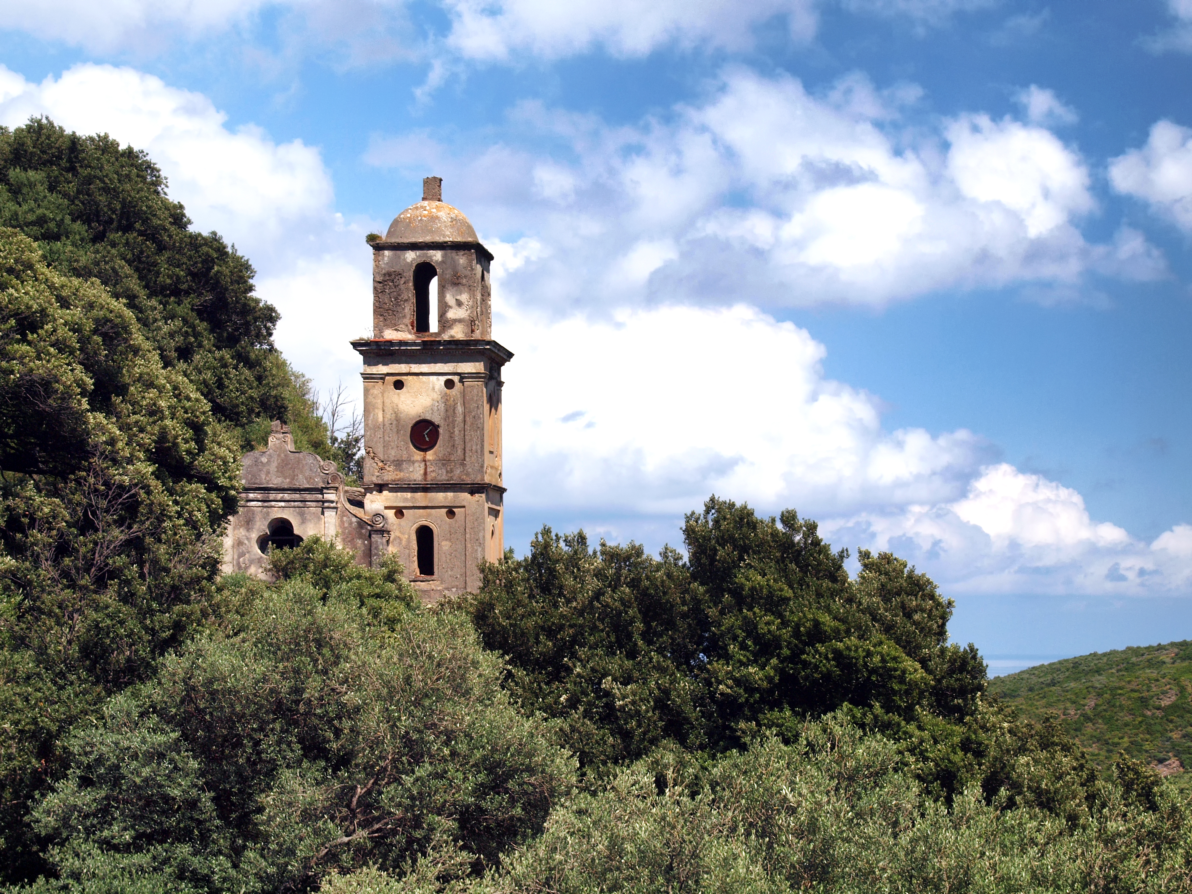 Rogliano, Cap Corse - Santa Chiara (Sainte-Claire), église désaffectée à Magna Sottana.